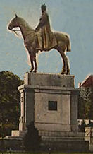 Kaiser-Wilhelm-Reiterstandbild in Spandau, Scan von Postkarte von 1912